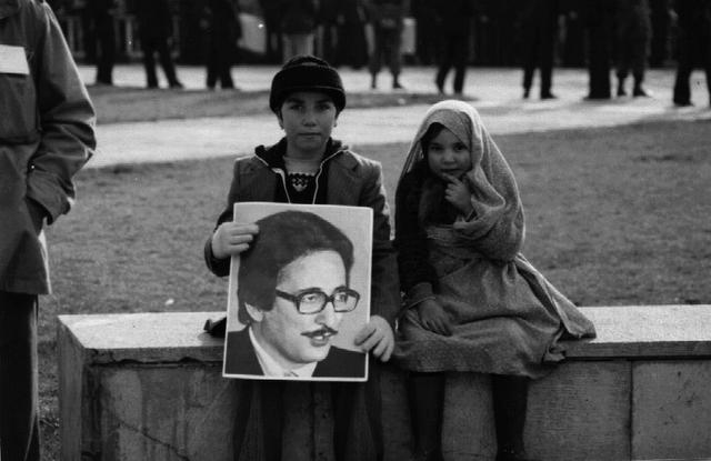 دو کودک که برای حمایت ابوالحسن بنی صدر عکسی از وی را در دست گرفته اند